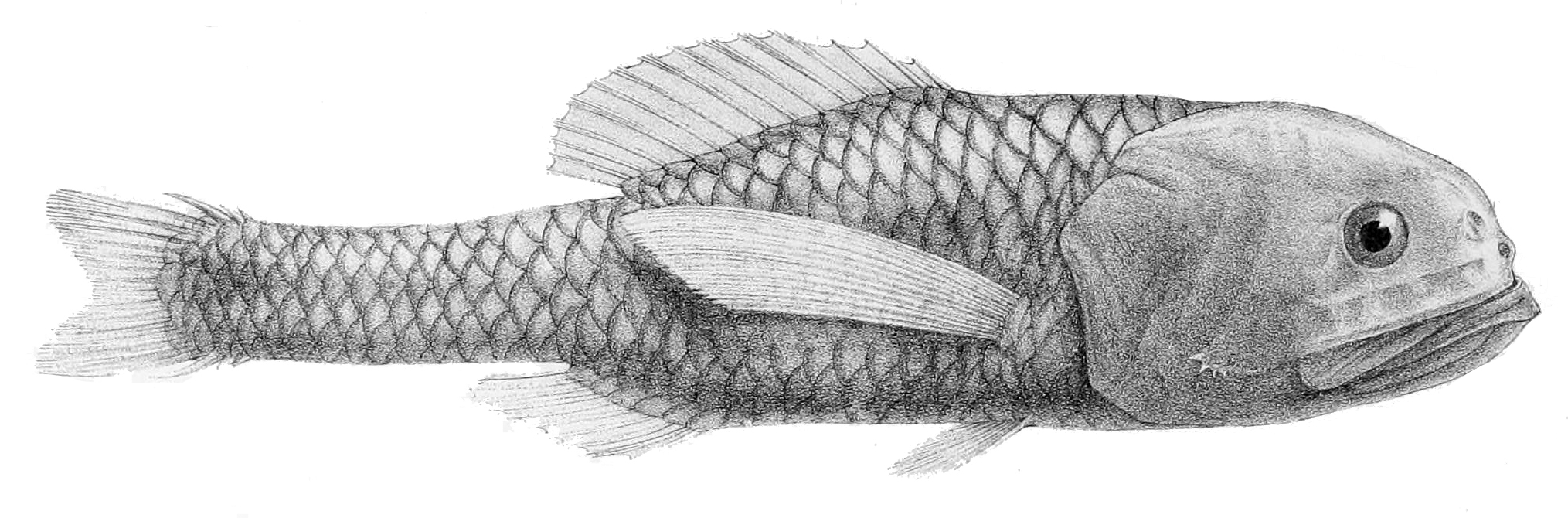 Poromitra crassiceps